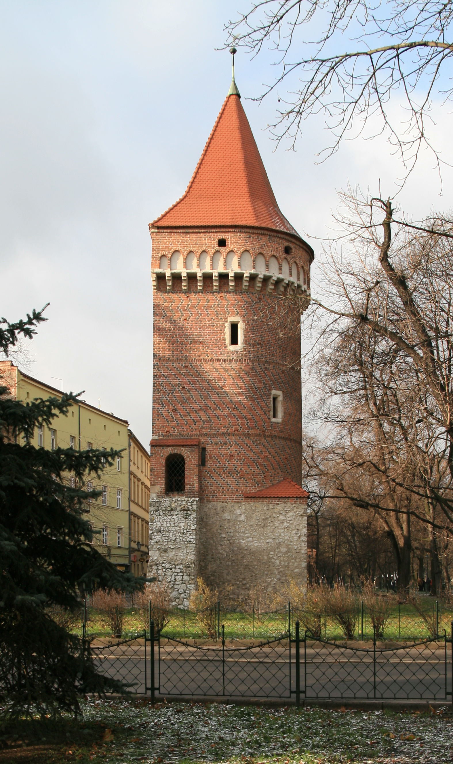 Baszta Pasamoników